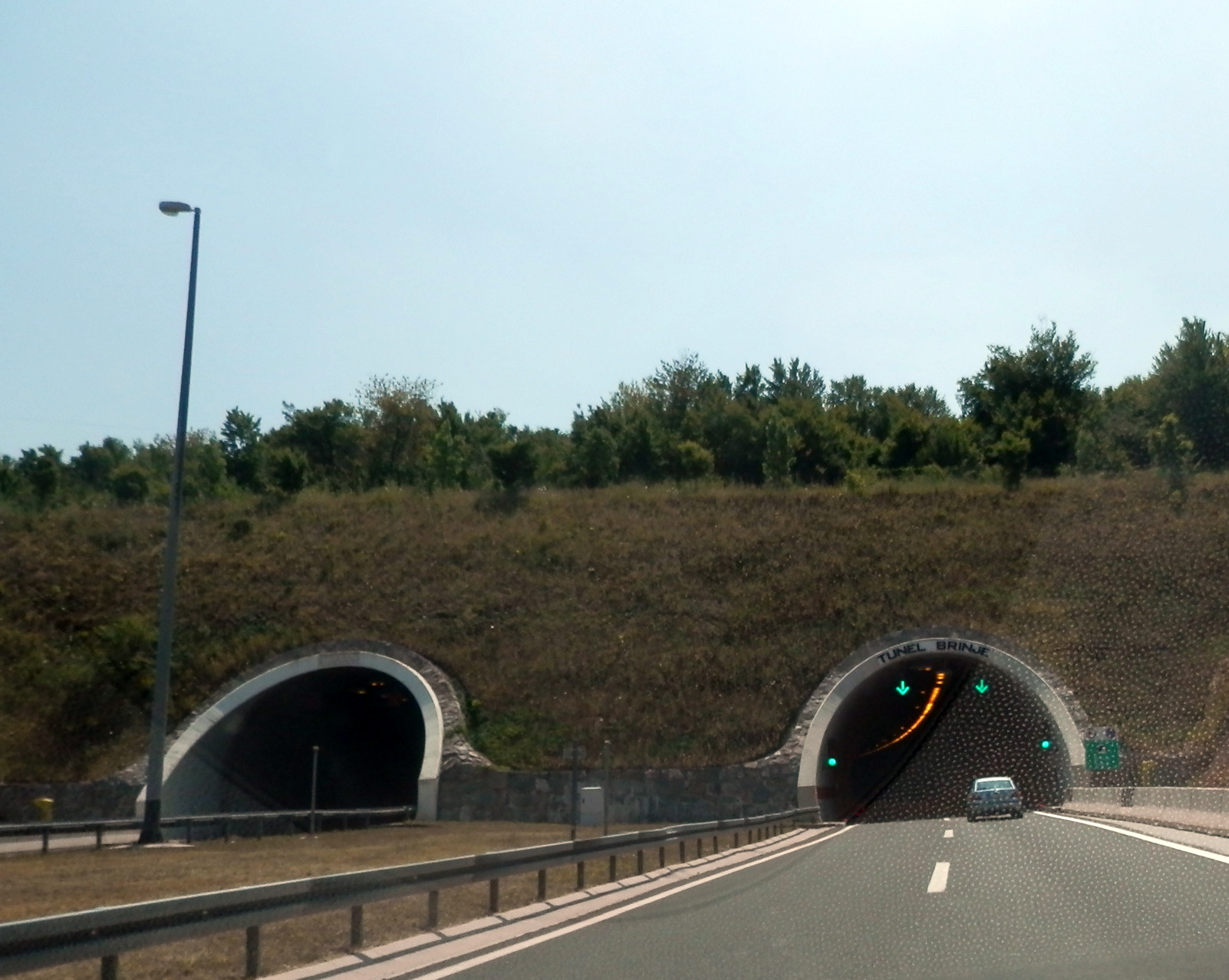 "Brinje" Tunnel. Diaľnica A1 v Chorvátsku. Leto 2013